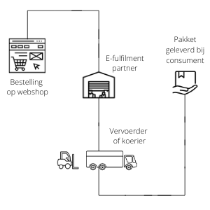 Eenvoudige voorstelling van e-fulfilment proces: van order op webshop tot levering bij klant.